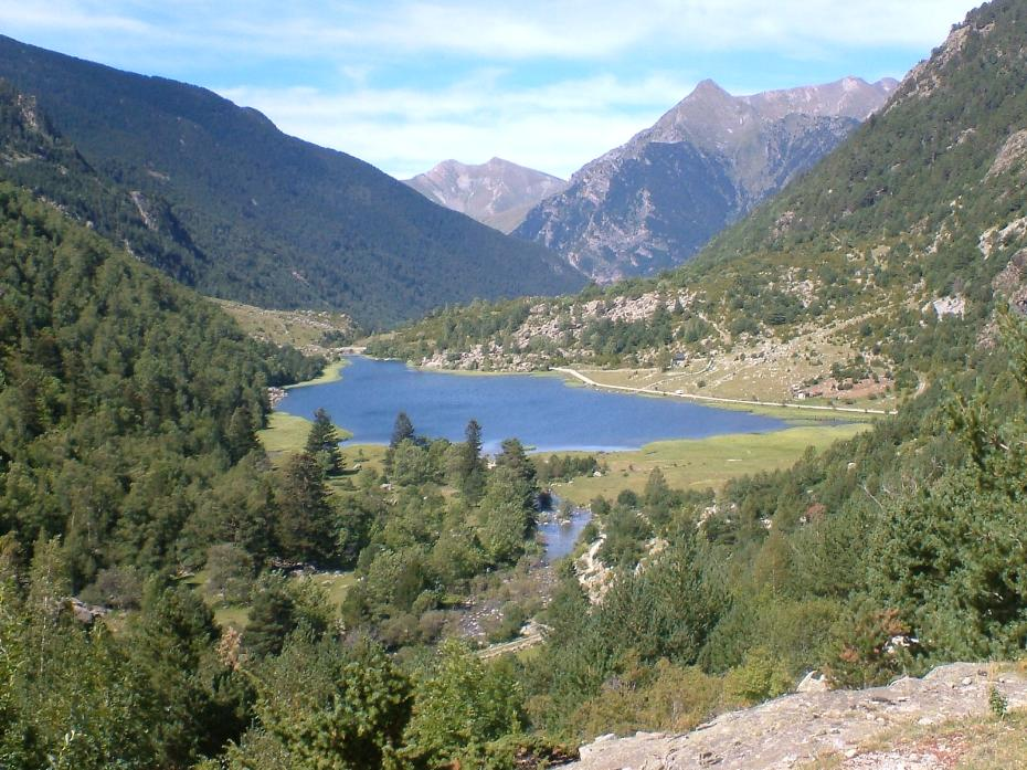 Cascada de Sant Esperit; la Vall de Boí, Alta Ribagorça, Catalunya